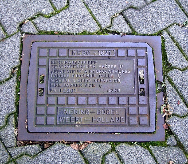 Benzinabscheider